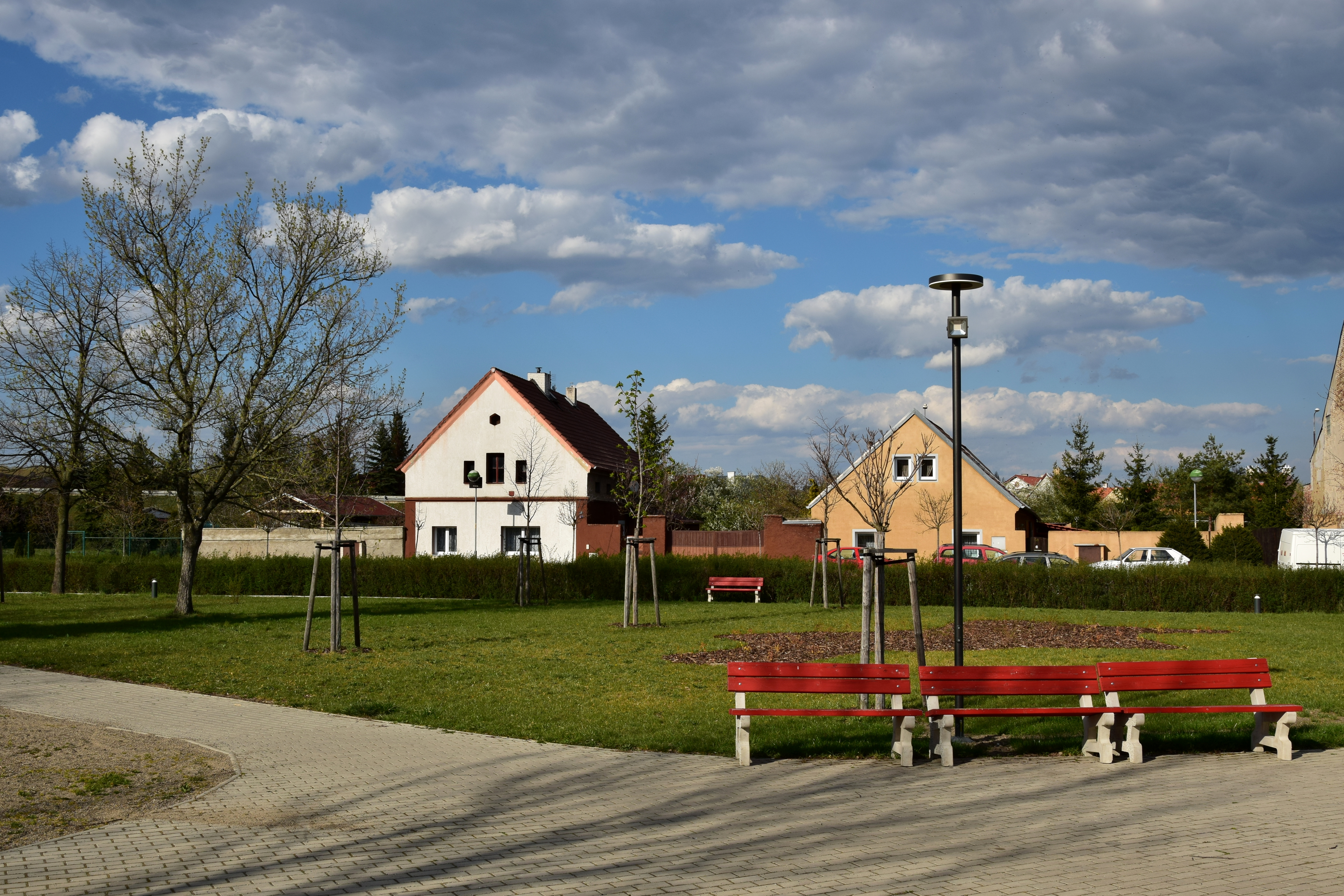 Spořice – náměstí Generála Svobody